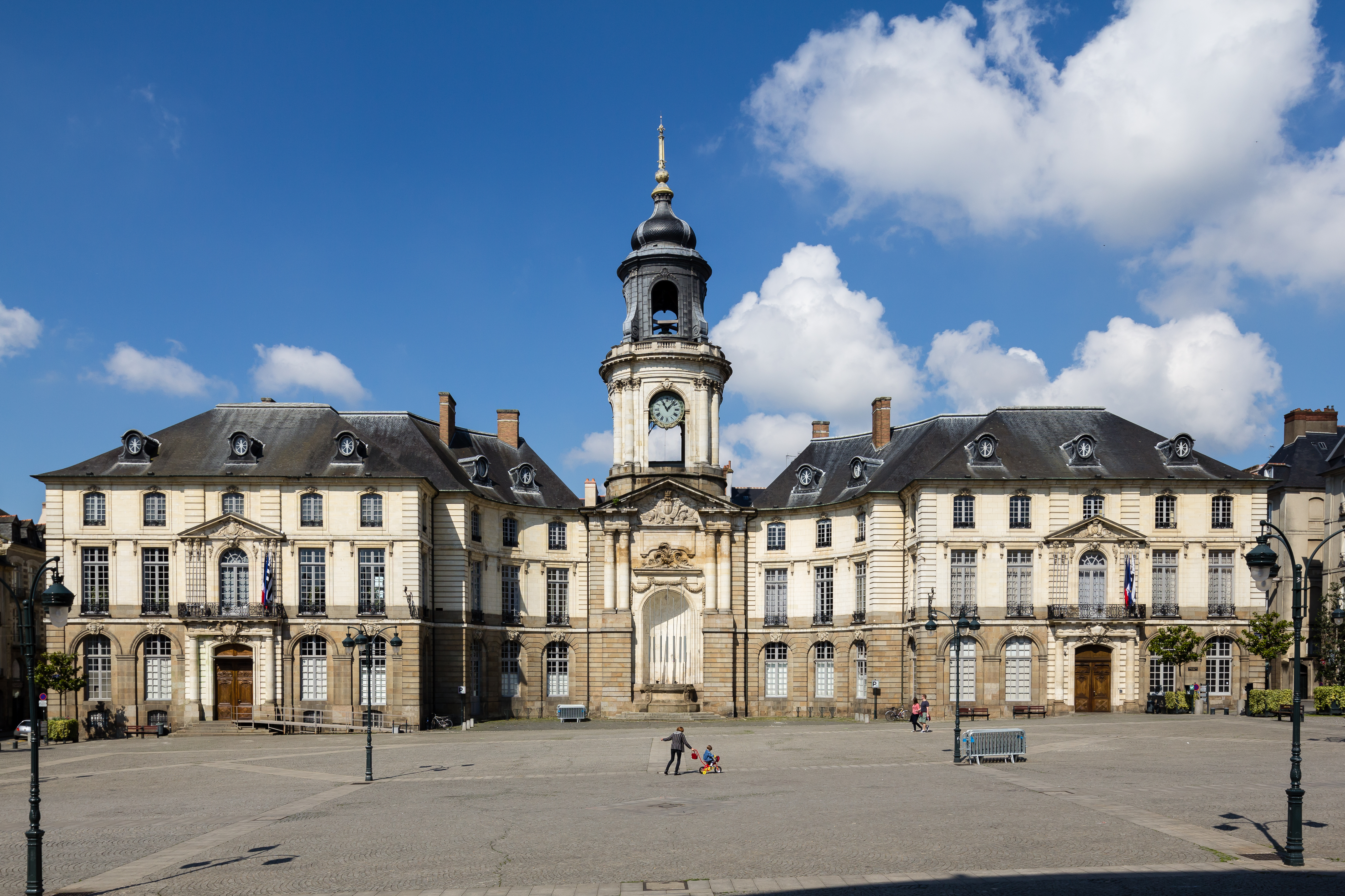 Façade de l'hôtel de ville de Rennes (France).